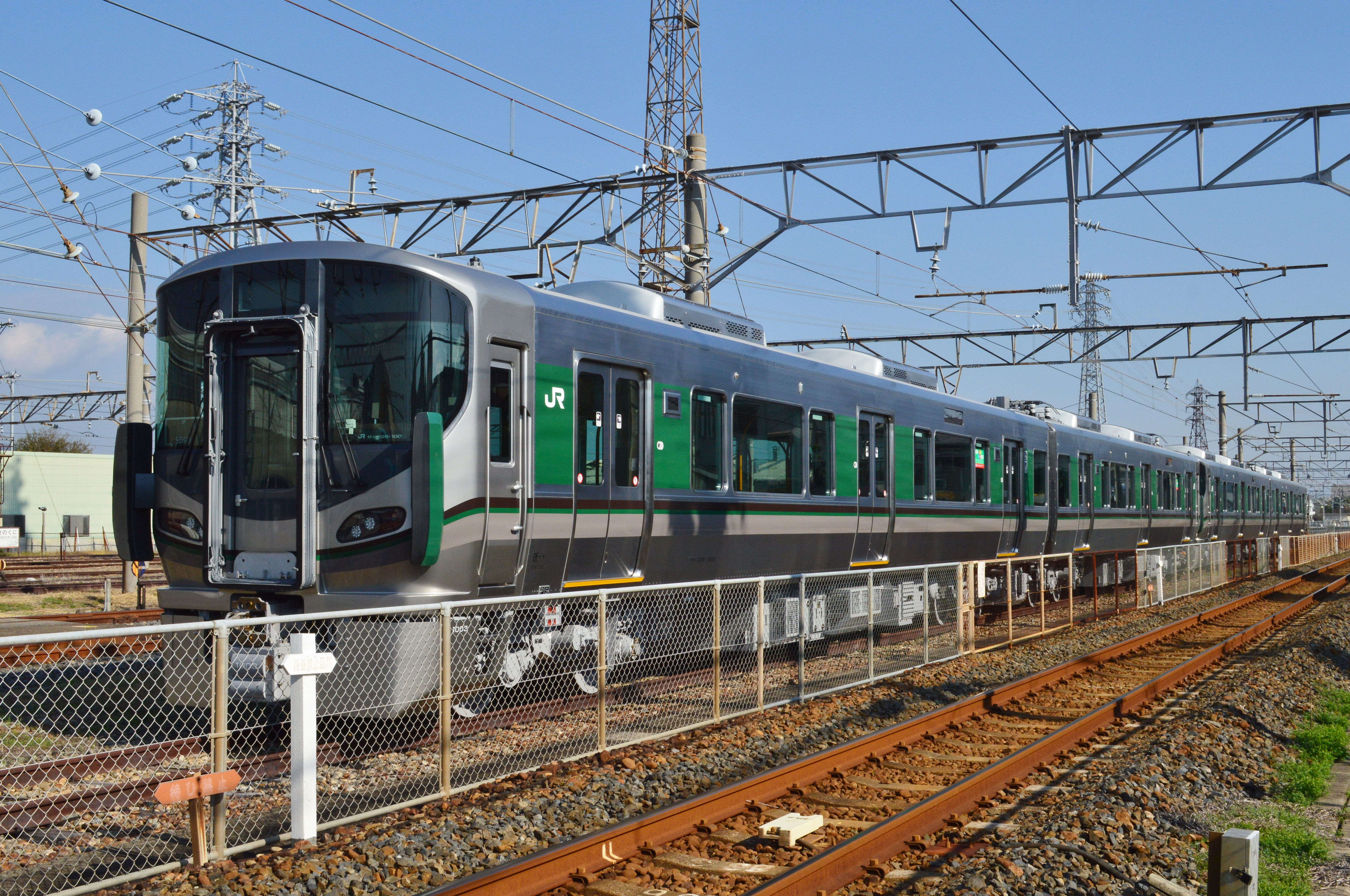 227系1000番台 (吹田総合車両所日根野支所新在家派出所にて) Nikon D3200